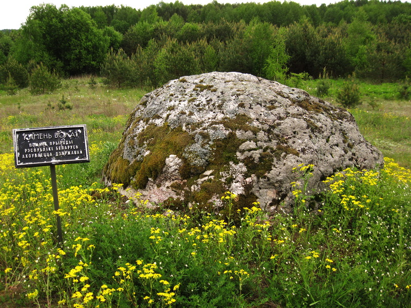 Камень-асілак. Дзятлаўскі раён